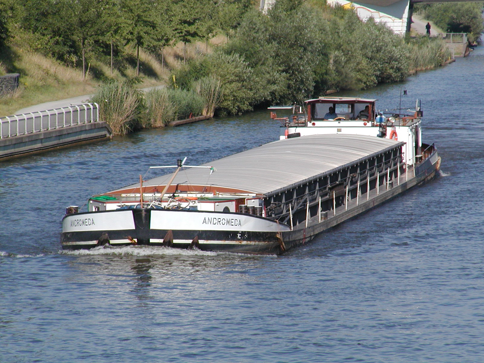 Die Andromeda auf dem Mittellandkanal in Hannover